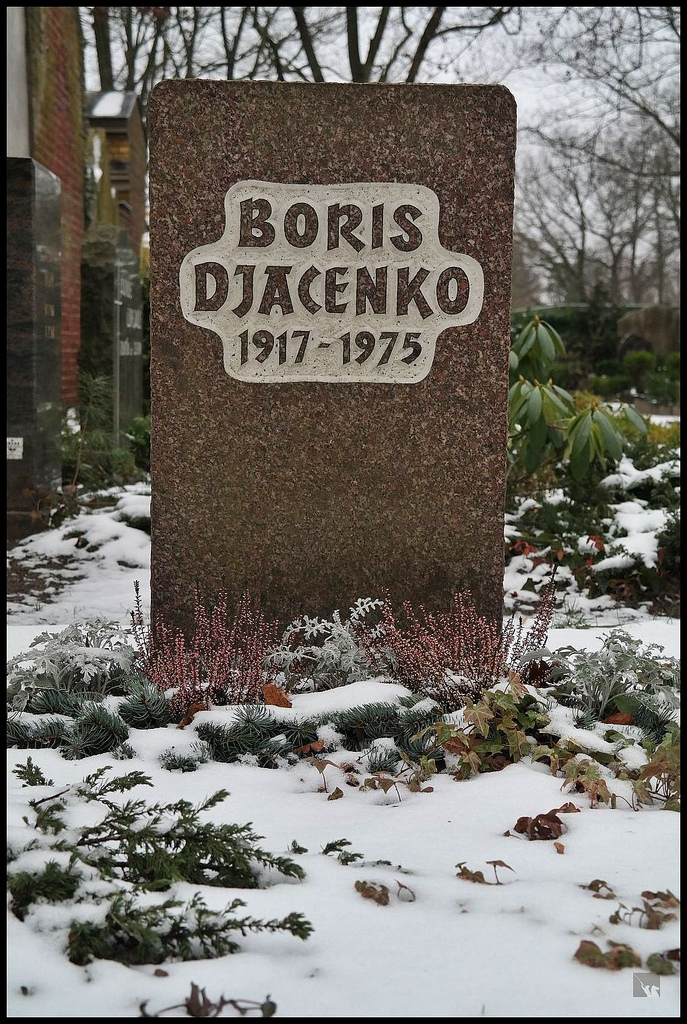 Grabstelle des Schriftstellers Boris Djacenko, auf dem Friedhof Berlin-Adlershof.